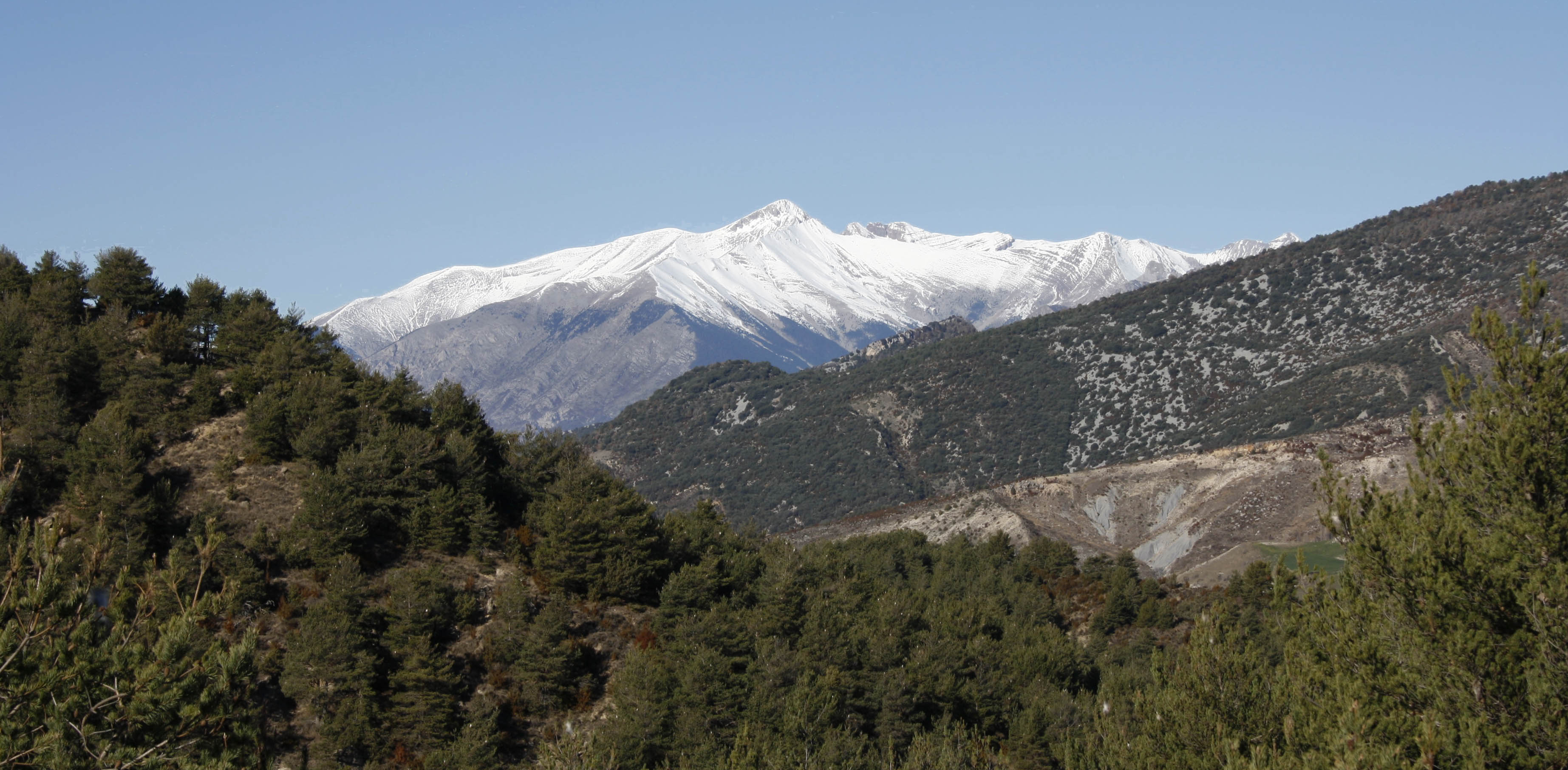 Imatge del Cotiella, Osca, Prepirineu d'Aragó